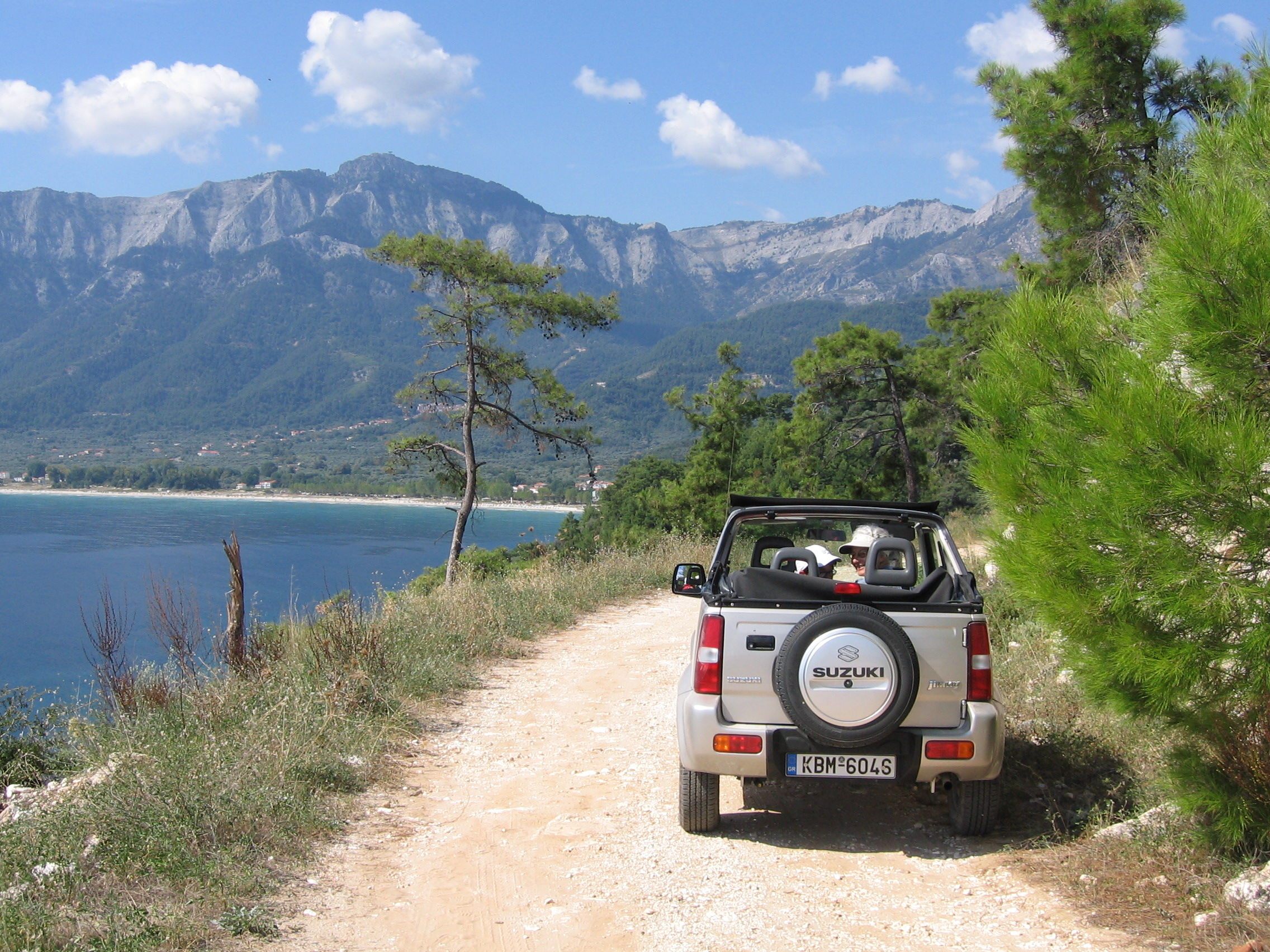 Potamia (2005)